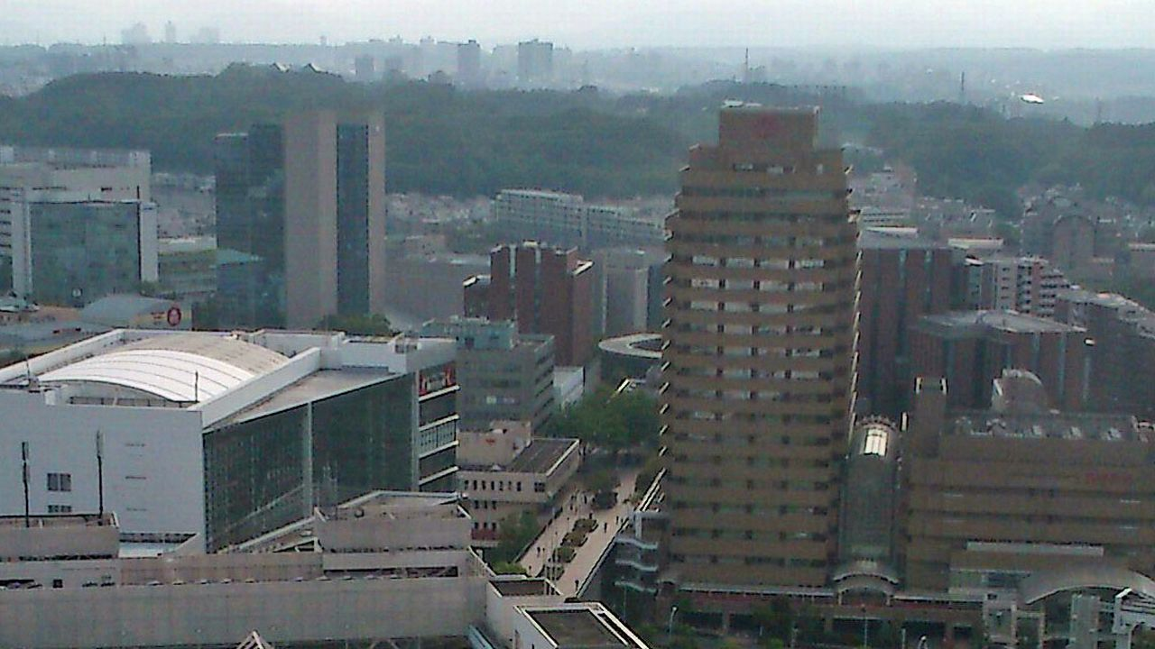 ベネッセビル展望台より多摩センターのオフィス街区（撮影：2013年05月25日）